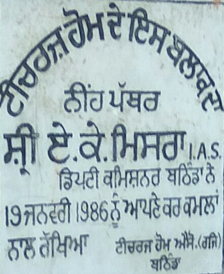 ਬਠਿੰਡੇ ਵਿੱਚ ਇੱਕ ਮੀਟਿੰਗ ਸਥਾਨ